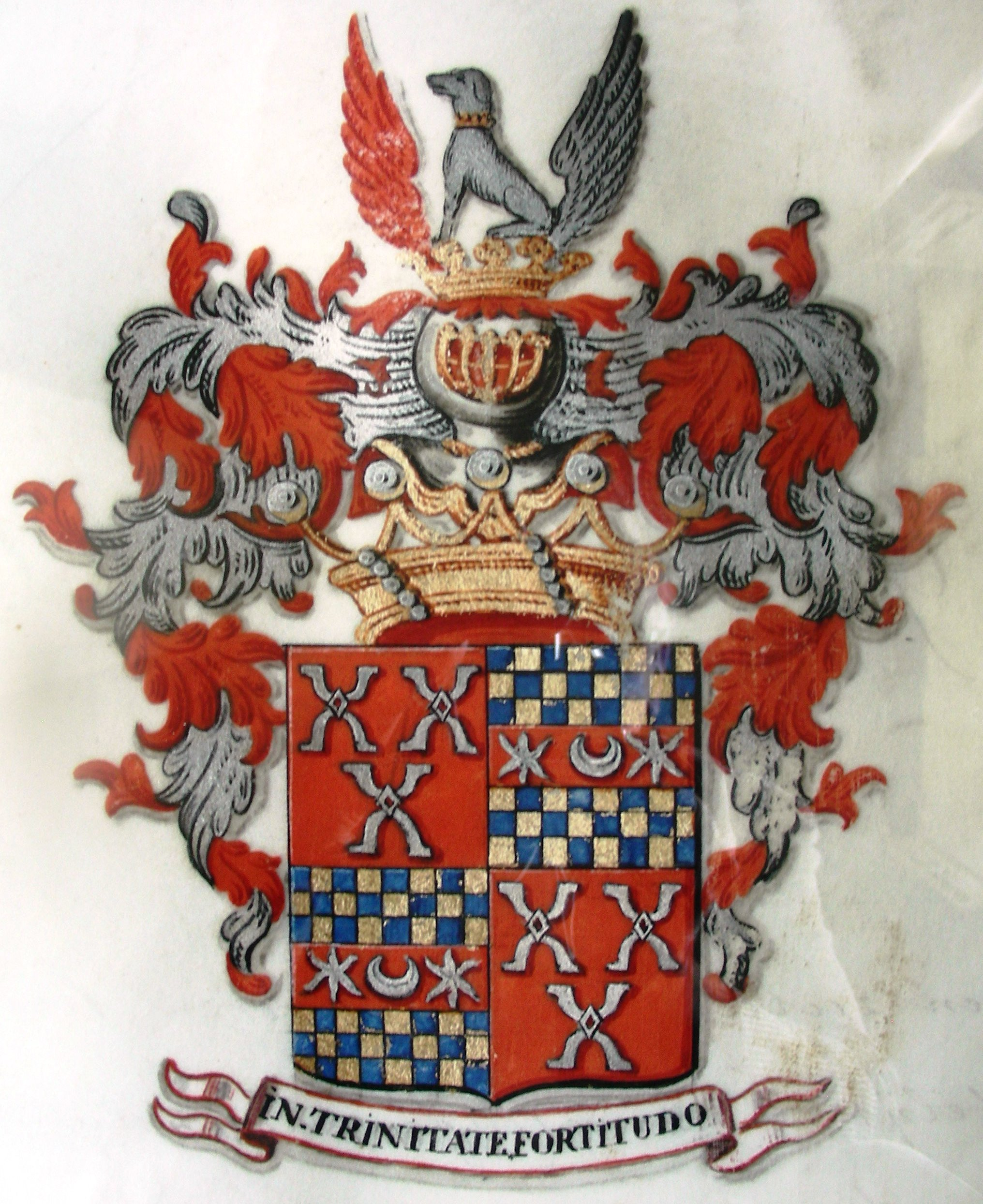 Gevierendeeld: I en IV het wapen Van Breugel; II en III geschaakt van blauw en goud, waarvan zichtbaar zijn zes rijen, elk van acht vlakken en een rode dwarsbalk, beladen met een wassenaar tussen twee vlammende sterren, alles zilver.